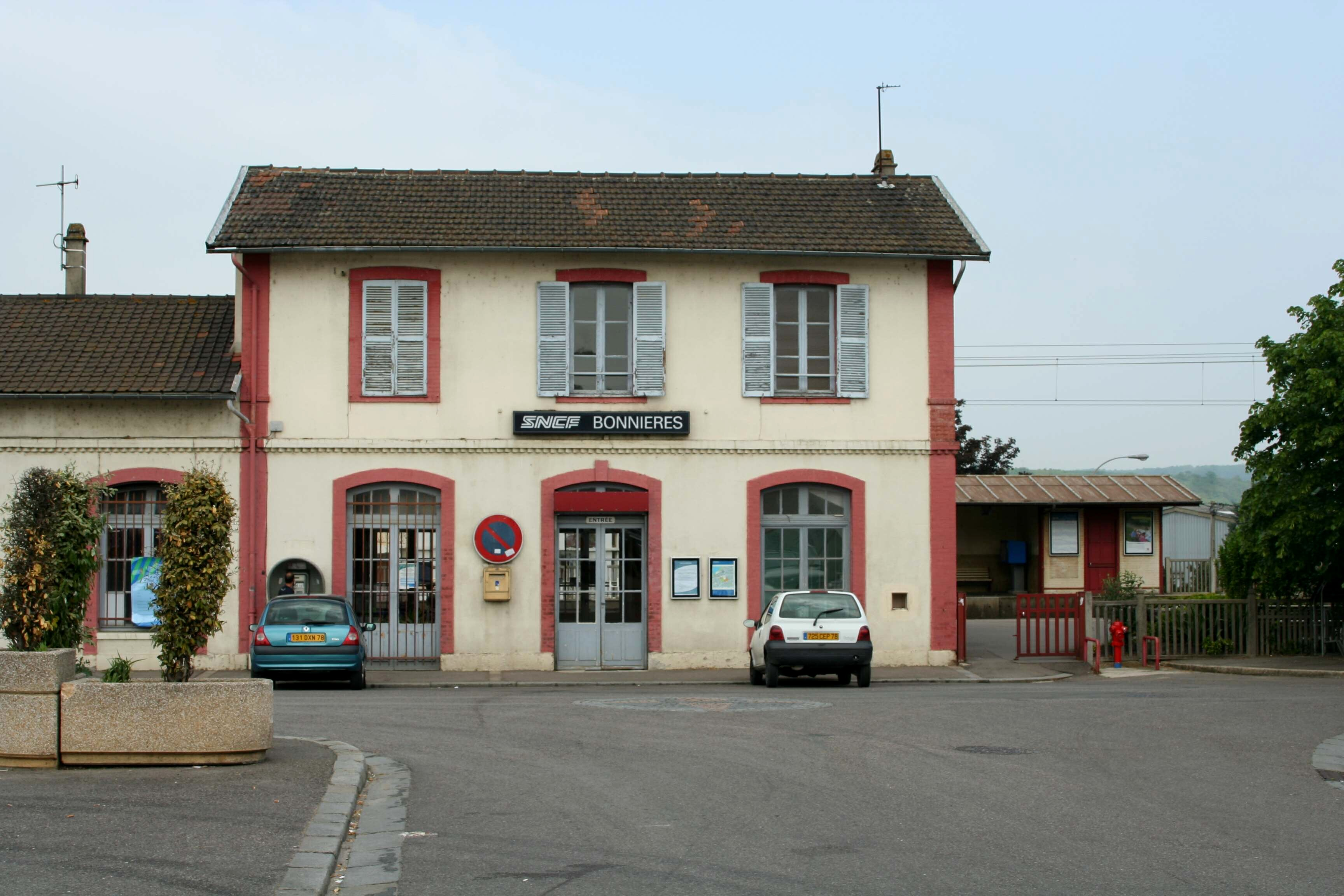 Gare de Bonnières-sur-Seine - Yvelines (France)